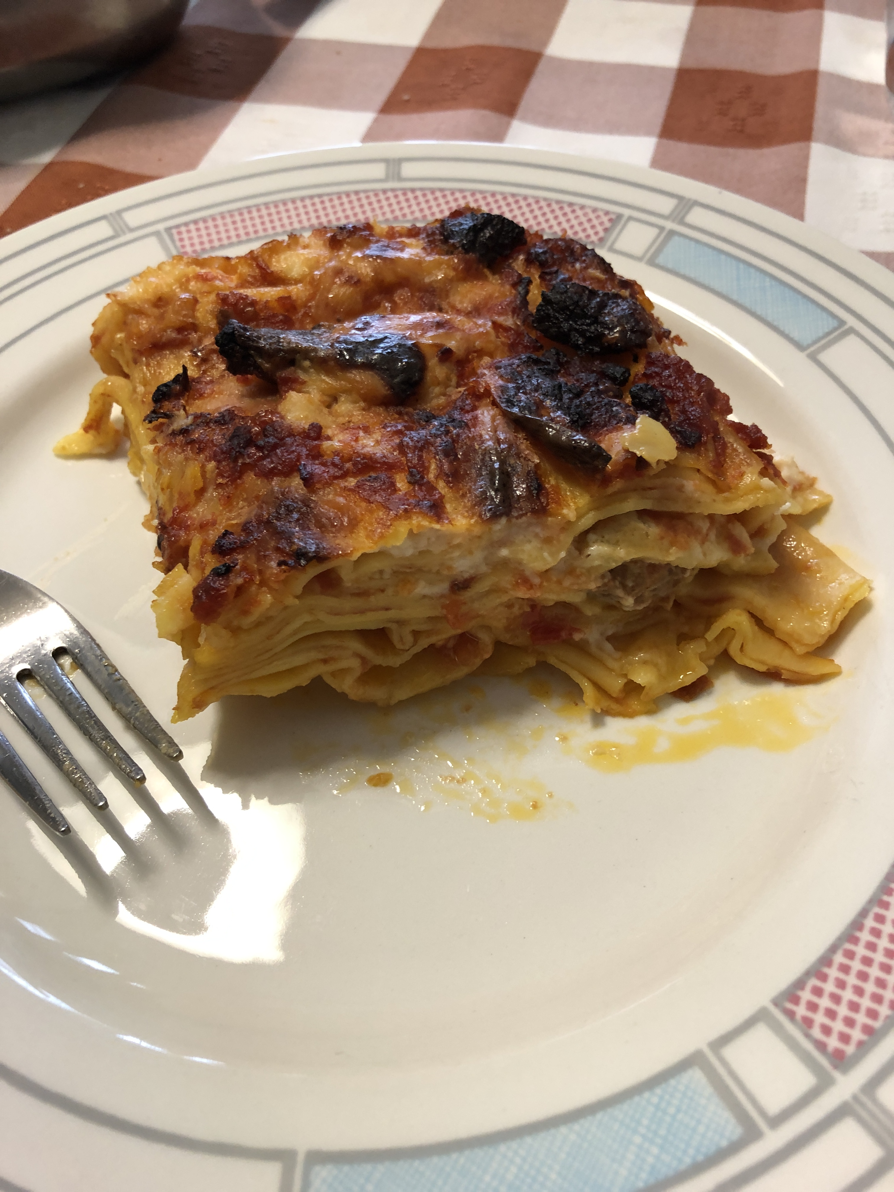 Uno scacco di vincisgrassi